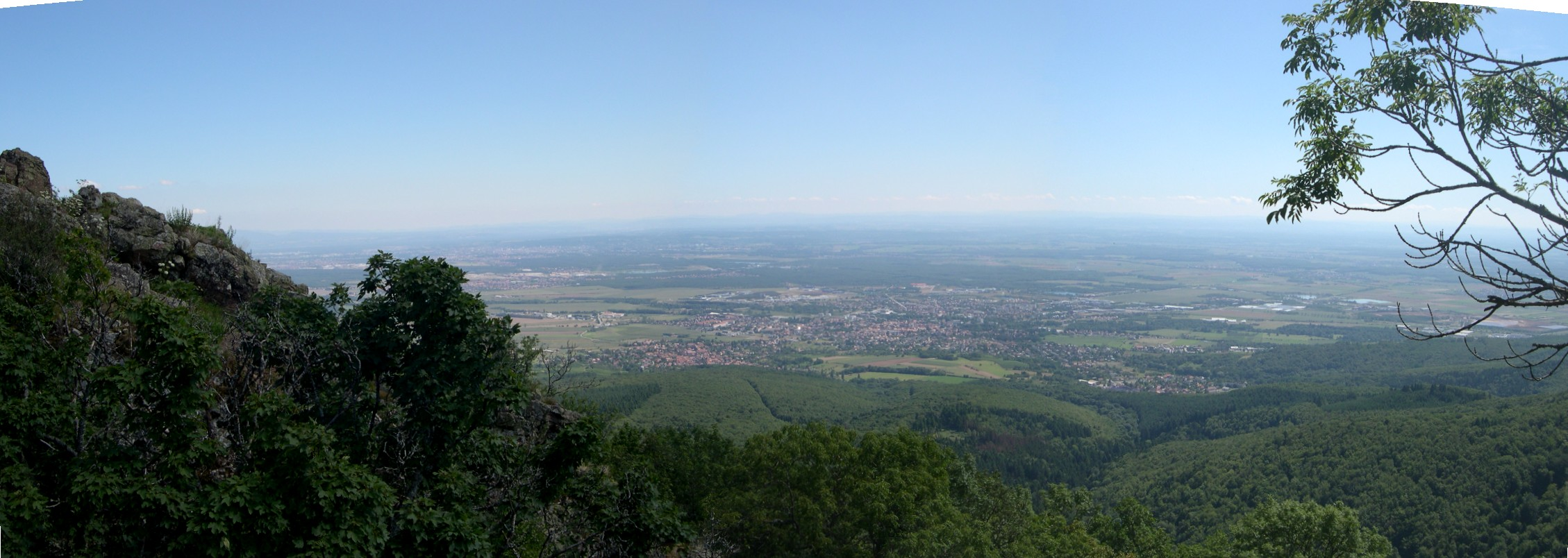 Vue panoramique de Cernay (Haut-Rhin) et une partie de la plaine d'Alsace depuis le massif des Vosges, Herrenfluf 857 m.